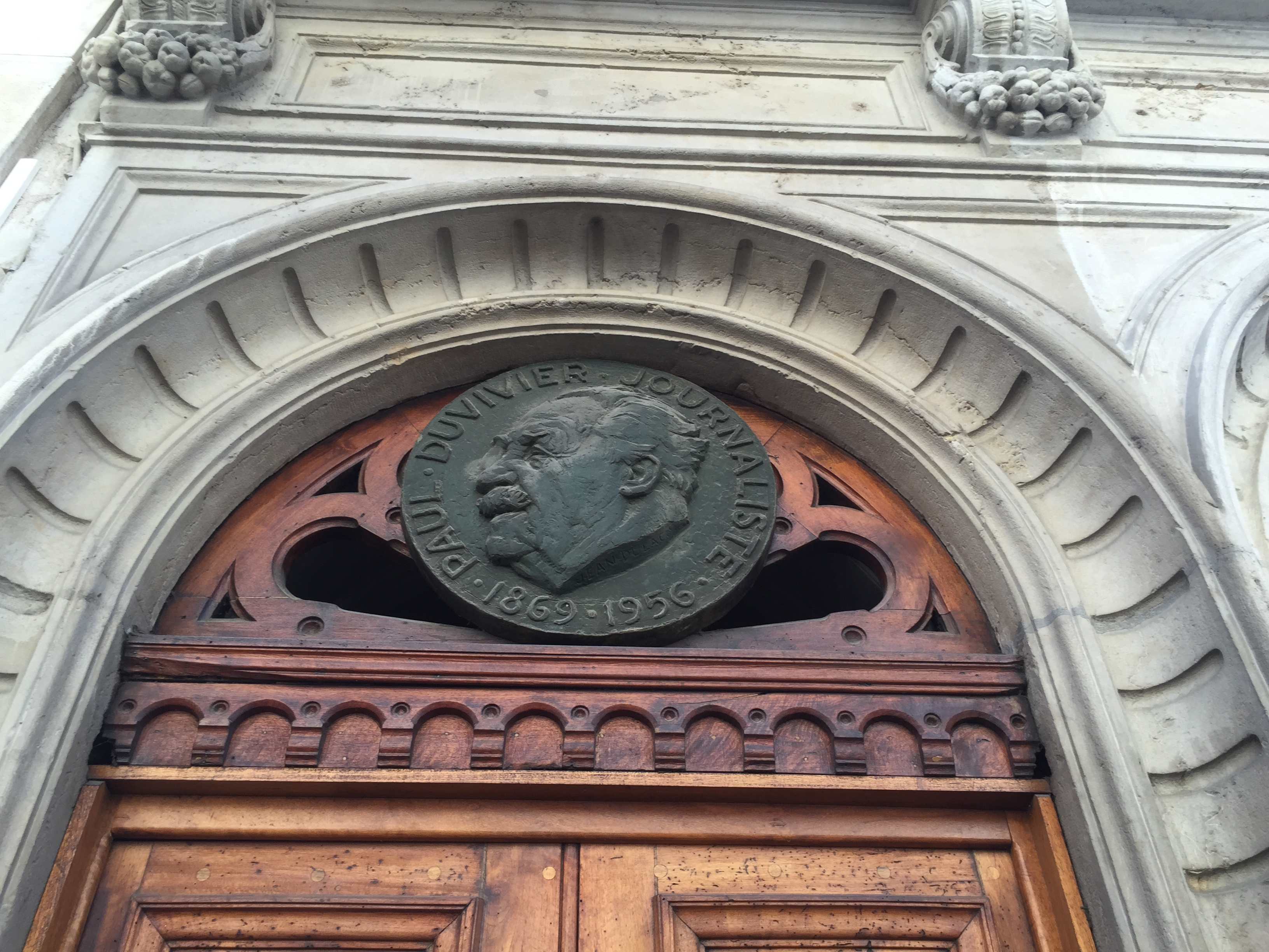 Plaque Paul Duvivier à Lyon - rue de la République à Lyon.